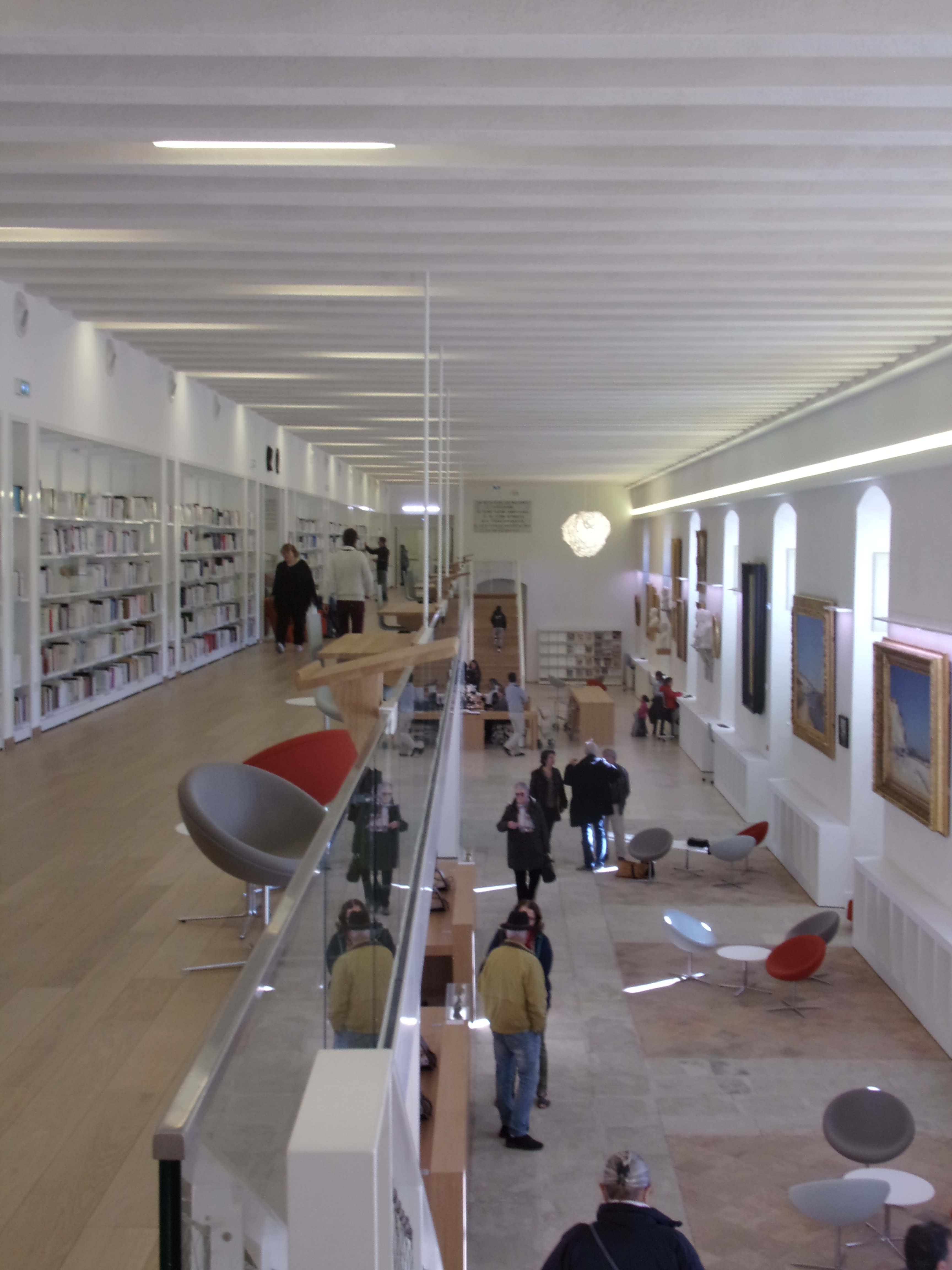 aménagement de la bibliothèque Inguimbertine, à l'hôtel dieu de Carpentras